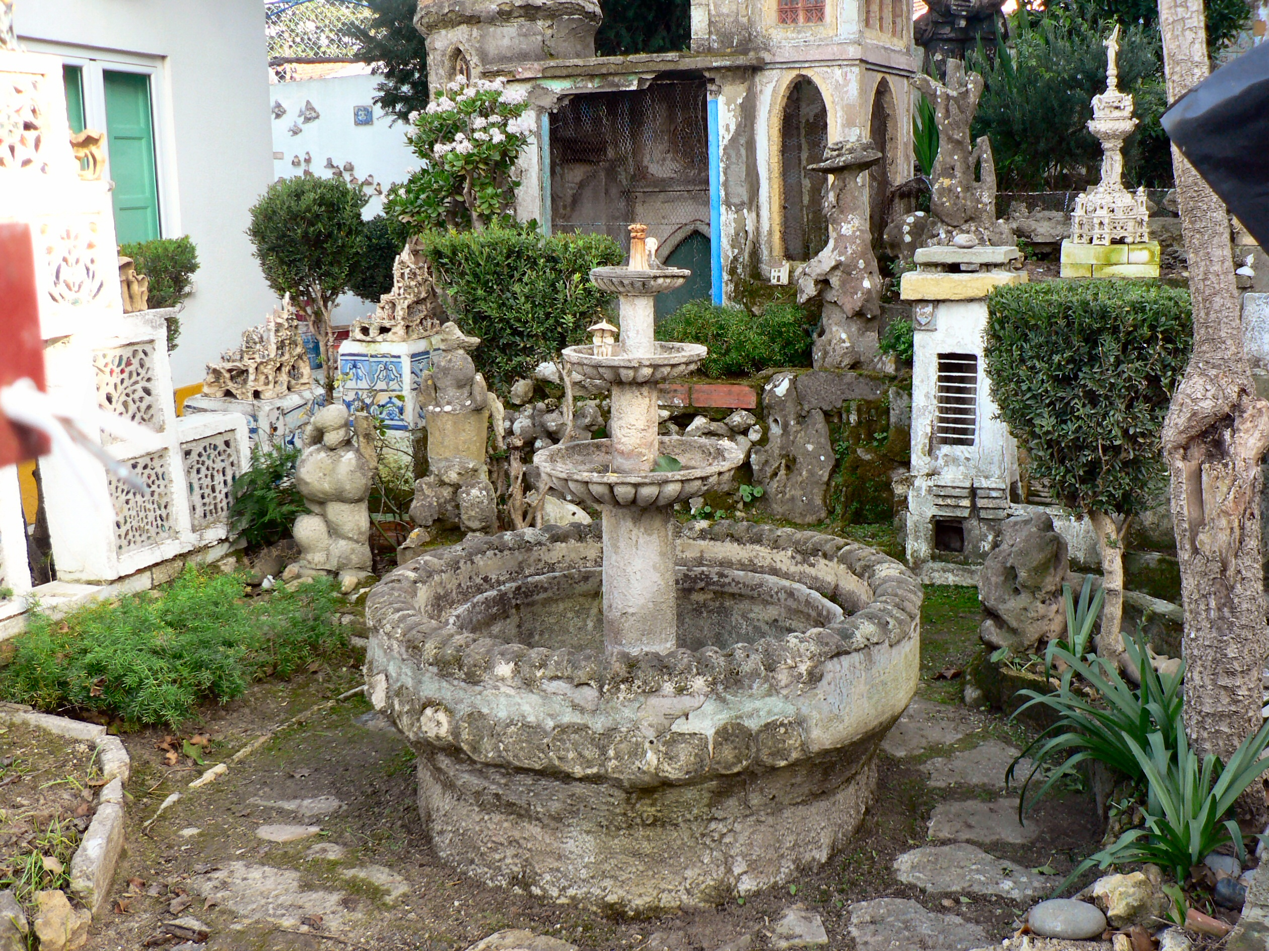 Casa-Museu José Pedro em Sacavém